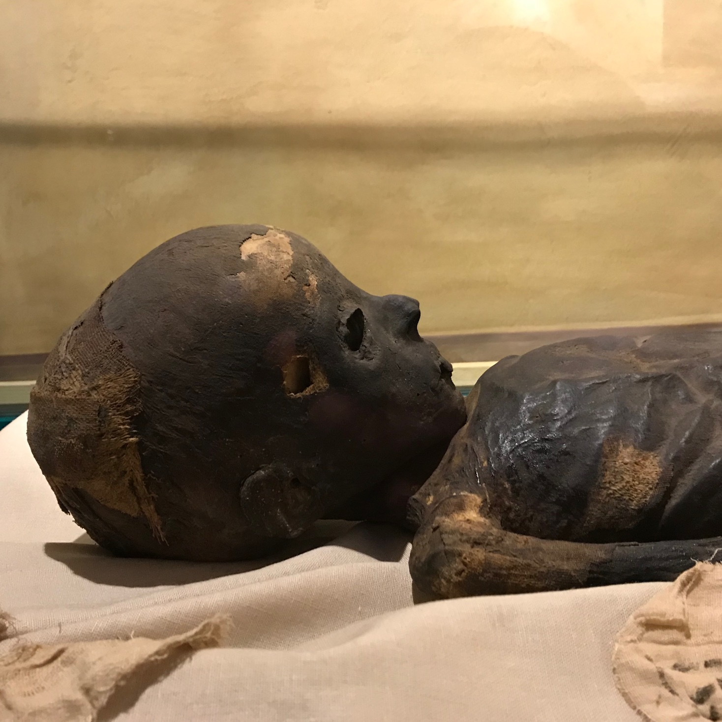 Tartu Ülikooli kunstimuuseumi üks muumiatest